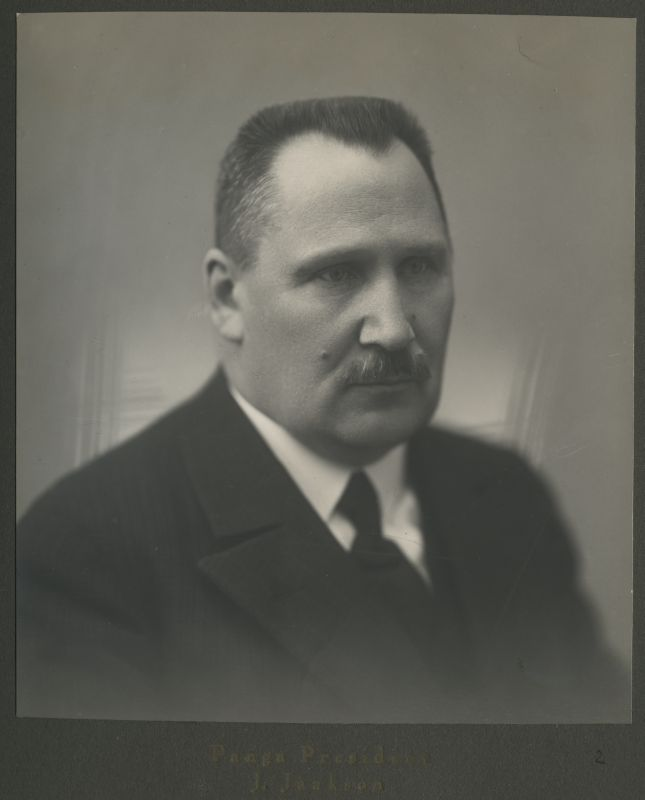 Portree: Eesti Panga president J. Jaakson